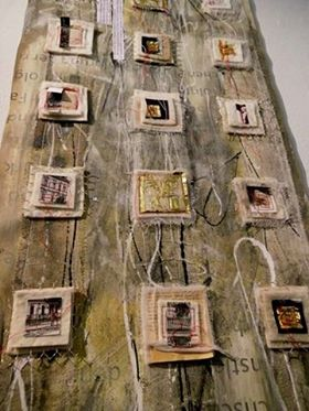 Collage in er Ausstellung GlockenStadtMuseum